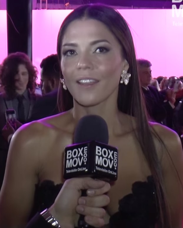 Shirley Gómez en los Premios TVyNovelas 2016